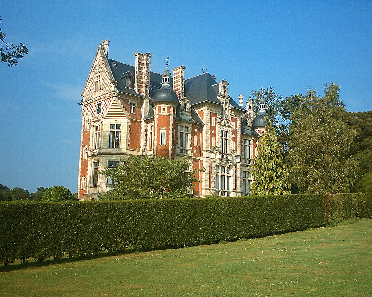 Manoir de Beuzeval, Houlgate in spring 2004.